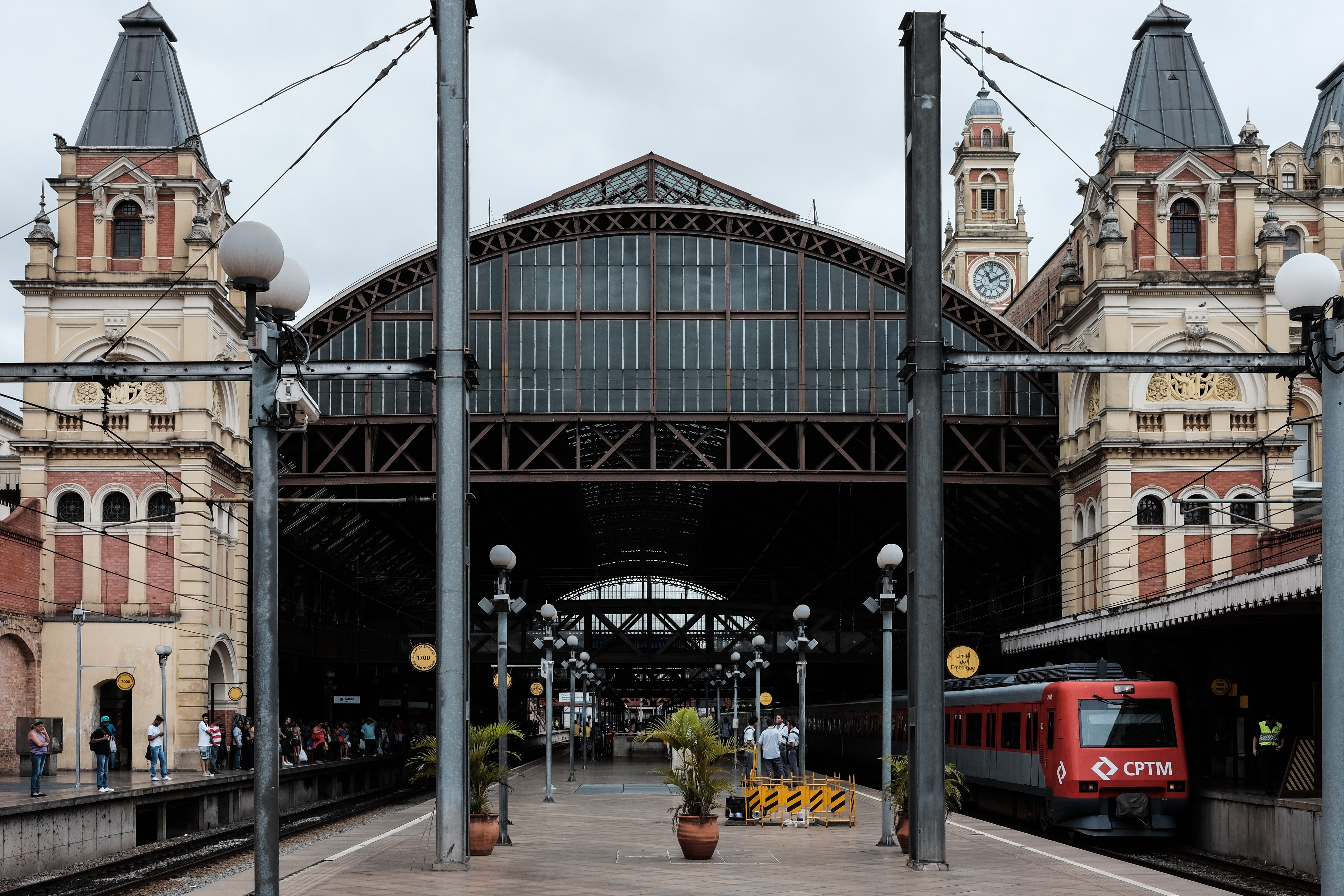 Vista interna da Estação da Luz, São Paulo